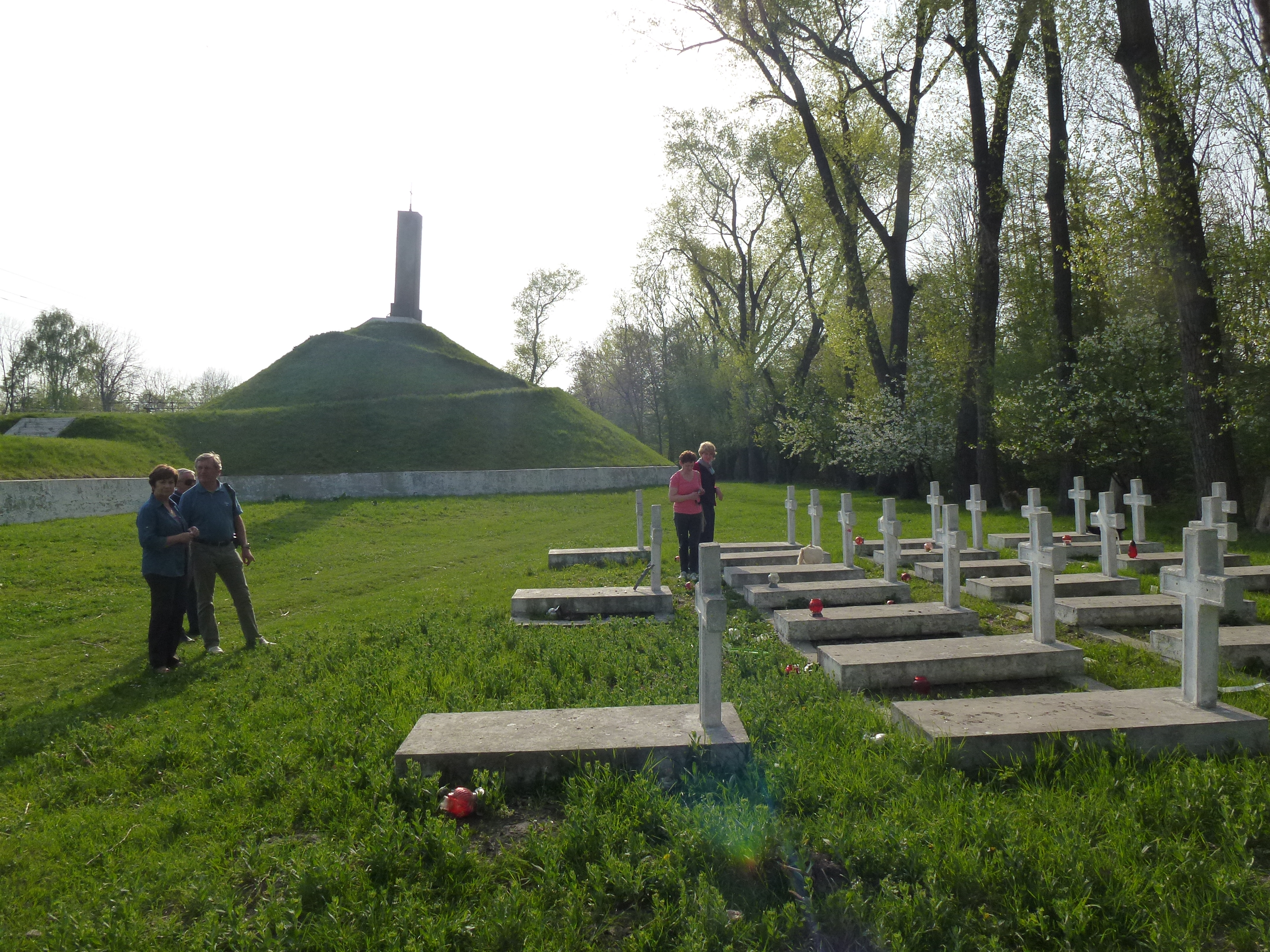 Cmentarz i pomnik polskich bohaterów bitwy pod Zadwórzem w sierpniu 1920 r.